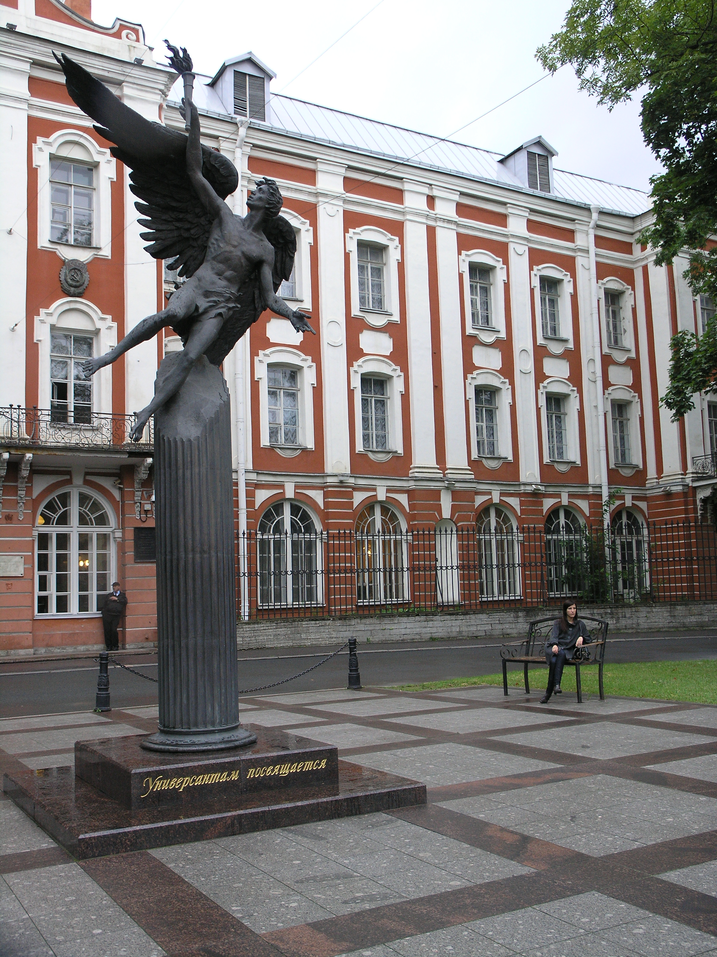 Главный корпус (Санкт-Петербург и Лен.область, Санкт-Петербург, менделеевская линия, 3, биржевой проезд, 1, 2)